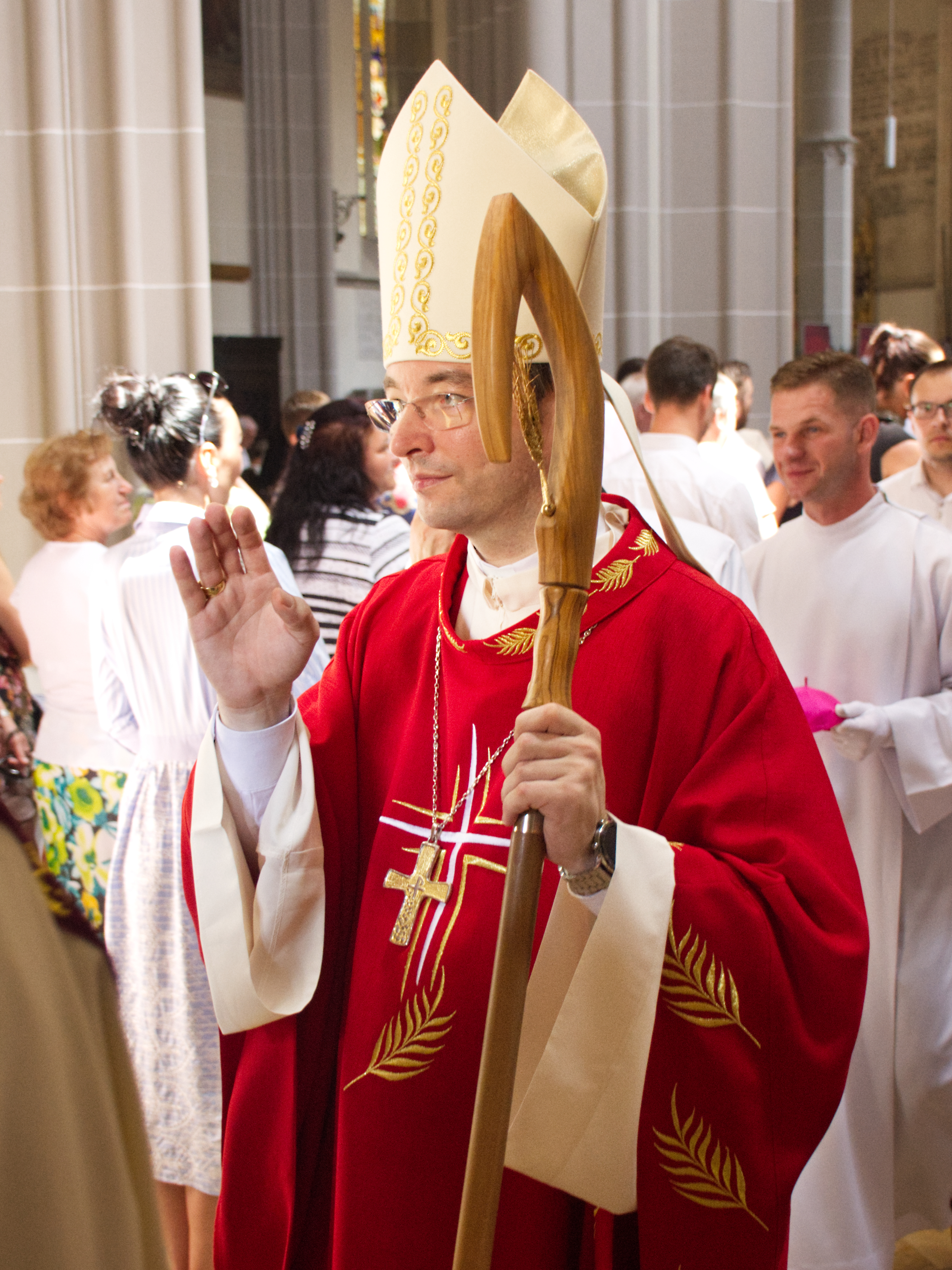 Monsignor Marek Forgáč, pomocný biskup košický, na diakonskej vysviacke nových diakonov v Dóme svätej Alžbety v Košiciach dňa 14. júna 2019